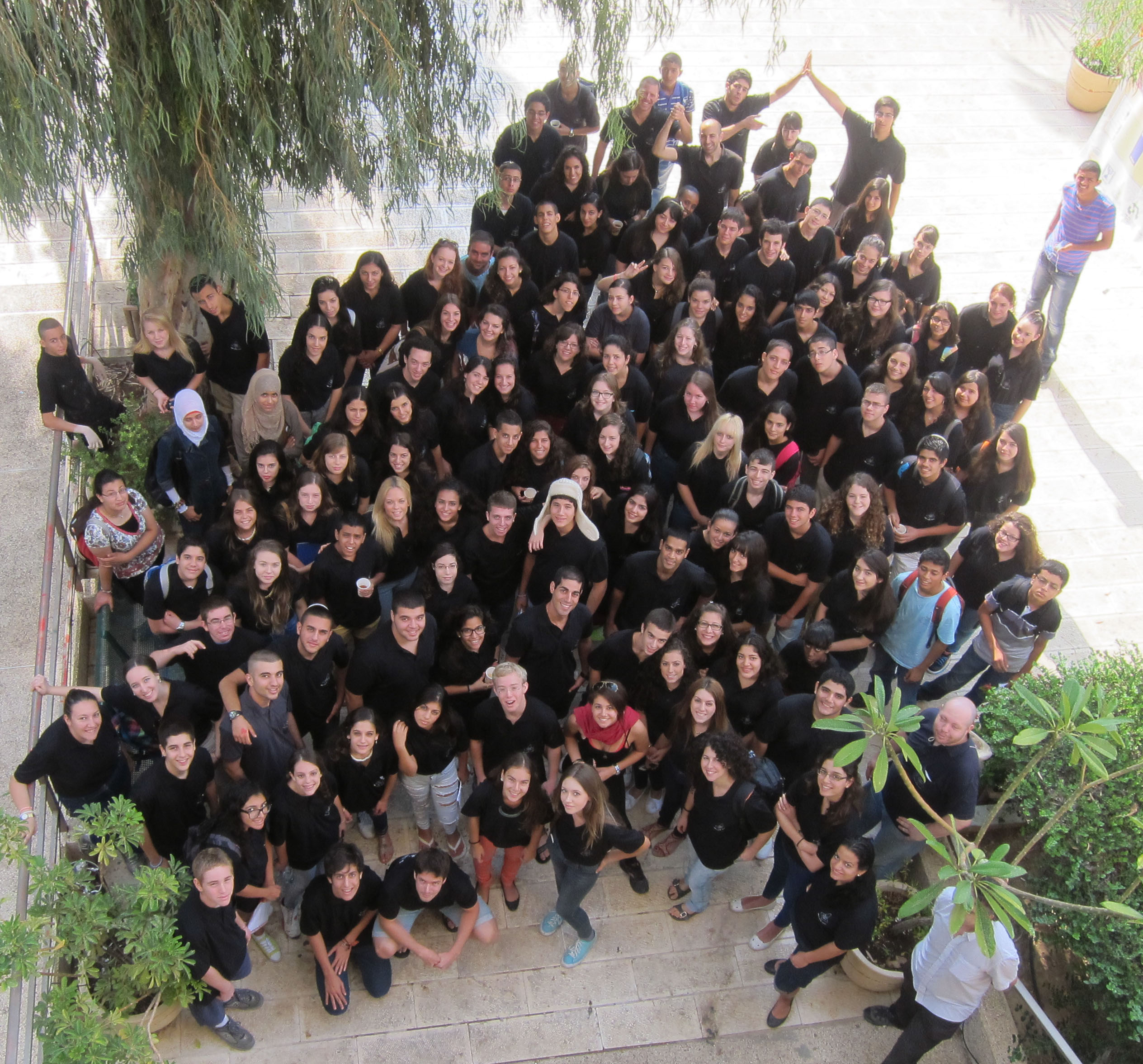 לקראת פסטיבל המדע ה 6, תמונה של כל הנוער המדריך בפסטיבל, ולוקח חלק בתכנית למנהיגות מדעית בבית יציב, ב"ש.